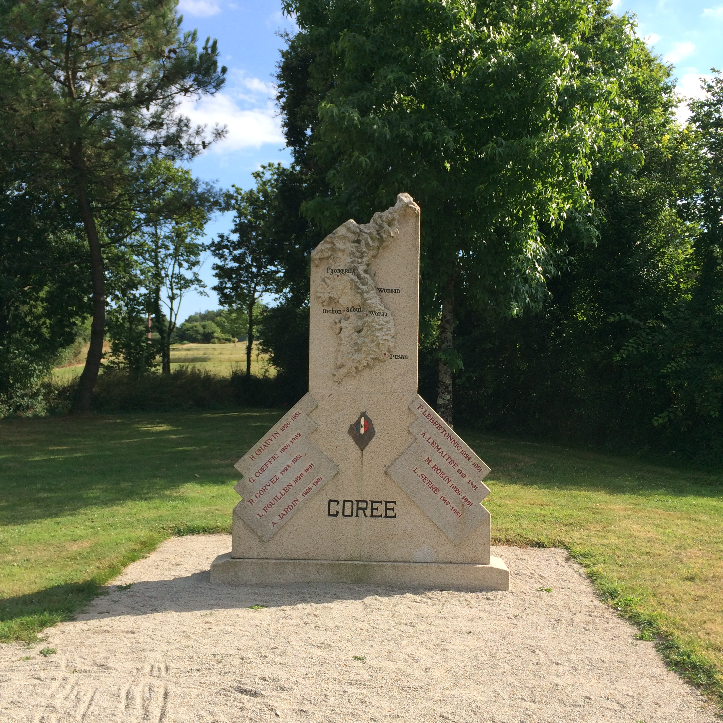 Photographie du village de Lauzach, Morbihan, France : mémorial départemental Corée Indochine